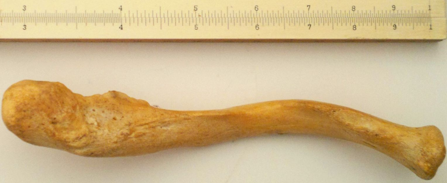 Clavícula medieval d'interès antropològic.